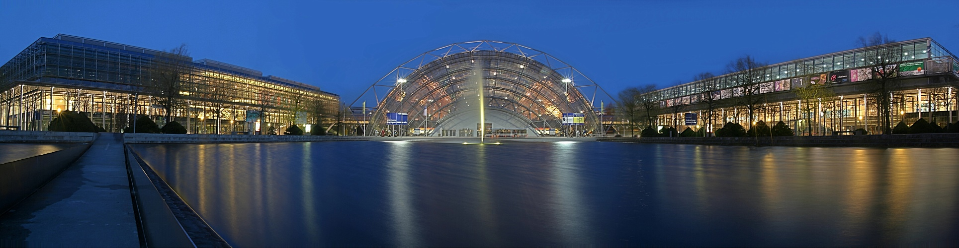 Leipziger Messe mit Congresscenter links und Glashalle – Panorama aus drei Querformaten, DRI aus je 5 Aufnahmen